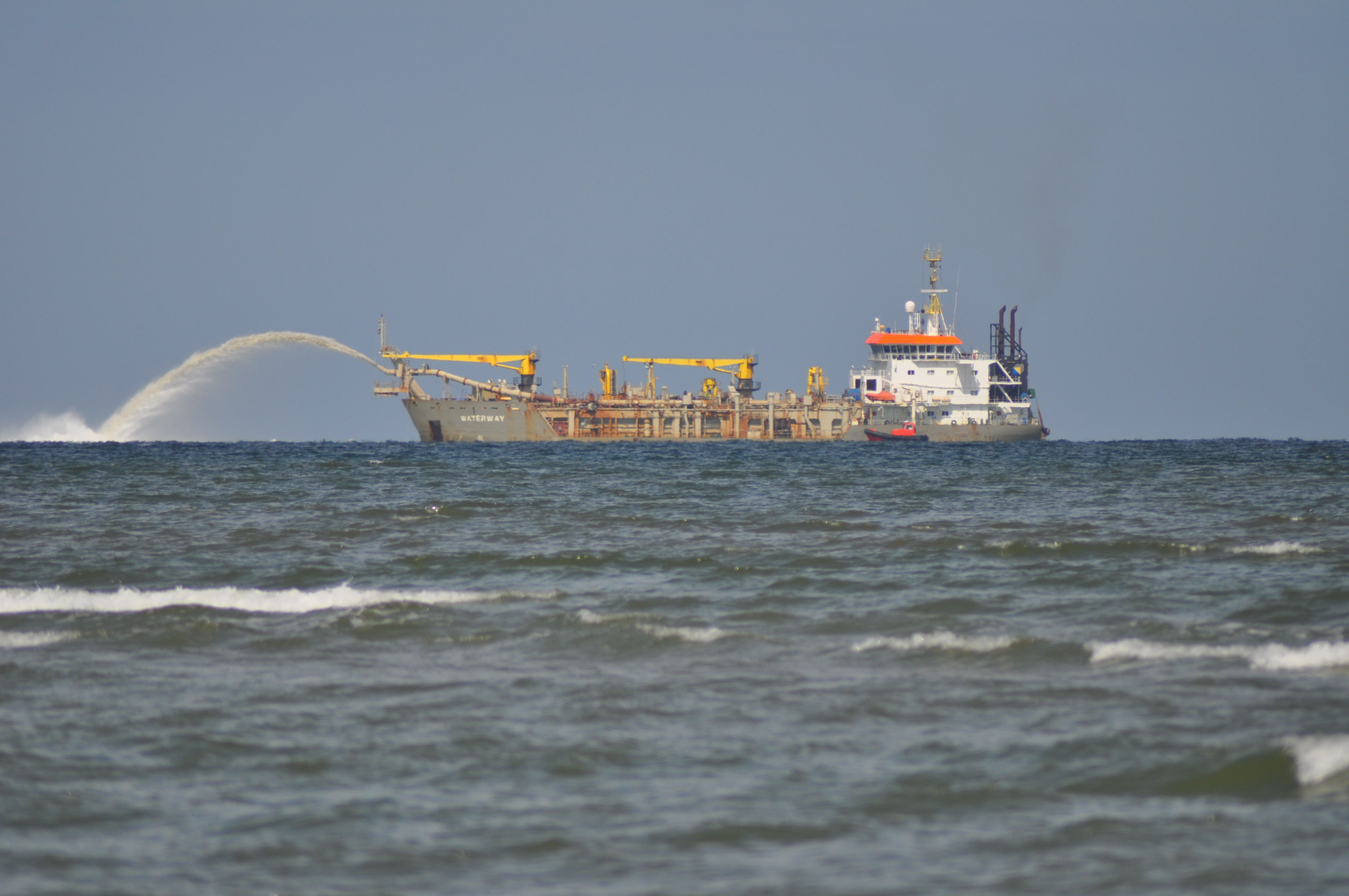 Sandvorspülung mit Hilfe des Rainbow-Verfahrens. Aufgrund mangelnder Tiefe kann das Saugbaggerschiff seine Bodenluken nicht öffnen, um den Sand zu platzieren. Daher wird der Sand vermischt mit Wasser an die Zielstelle gepumpt. Der entstehende Bogen (Regenbogen) führte zur Namensgebung des Verfahrens. Hier zu sehen ist die Waterway bei einer Sandvorspülung im Jahre 2010 vor der westfriesischen Insel Ameland.